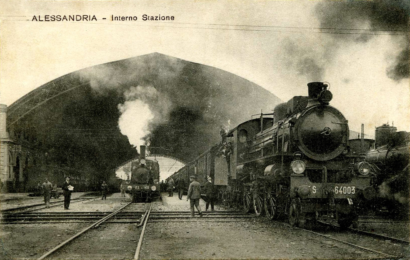 Stazione di Alessandria. Cartolina d'epoca. Collezione Tony Frisina - Alessandria.